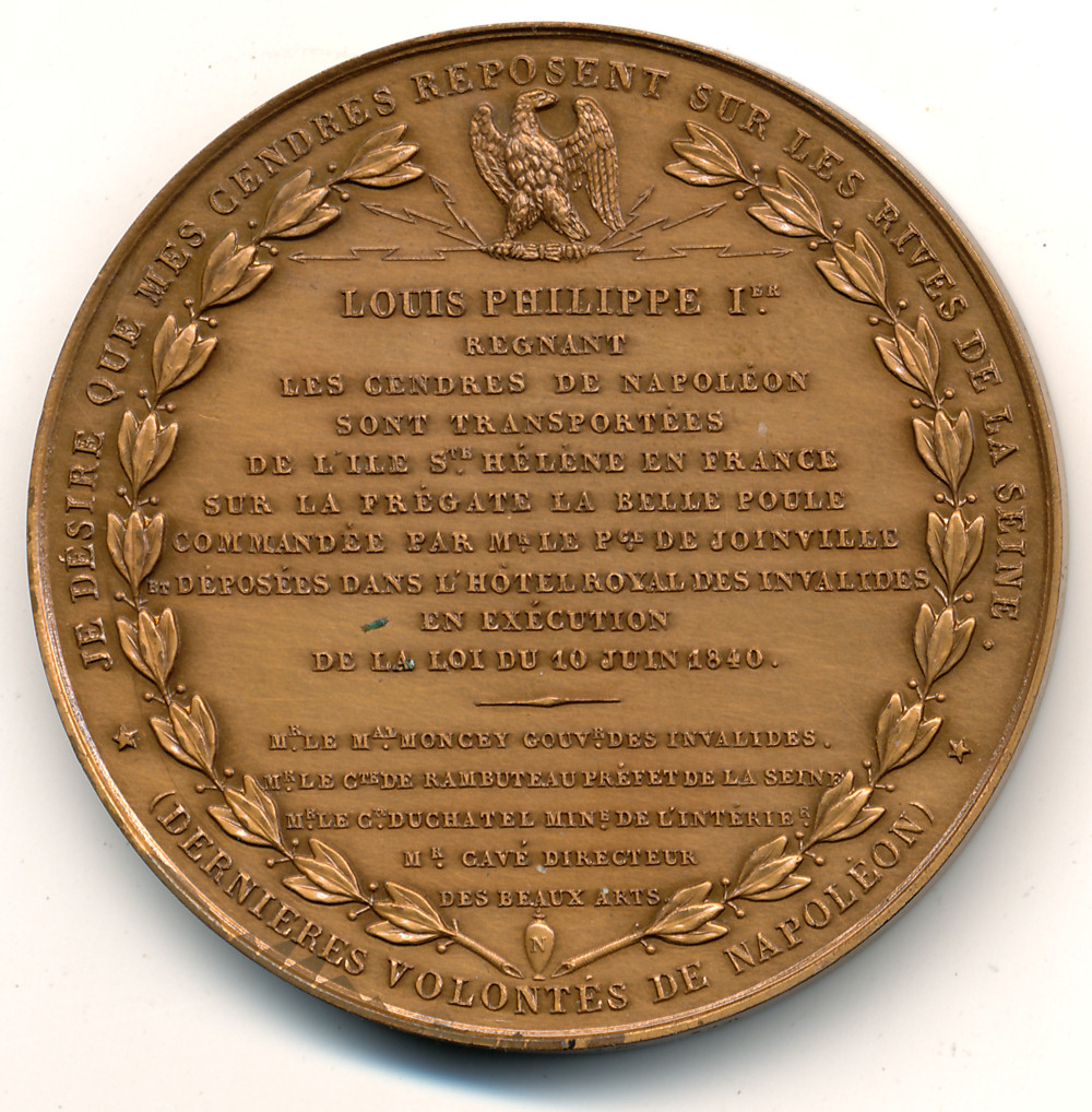 Revers de la médaille gravée en 1840 par Caqué pour le retour des cendres de l'Empereur, bronze 52mm